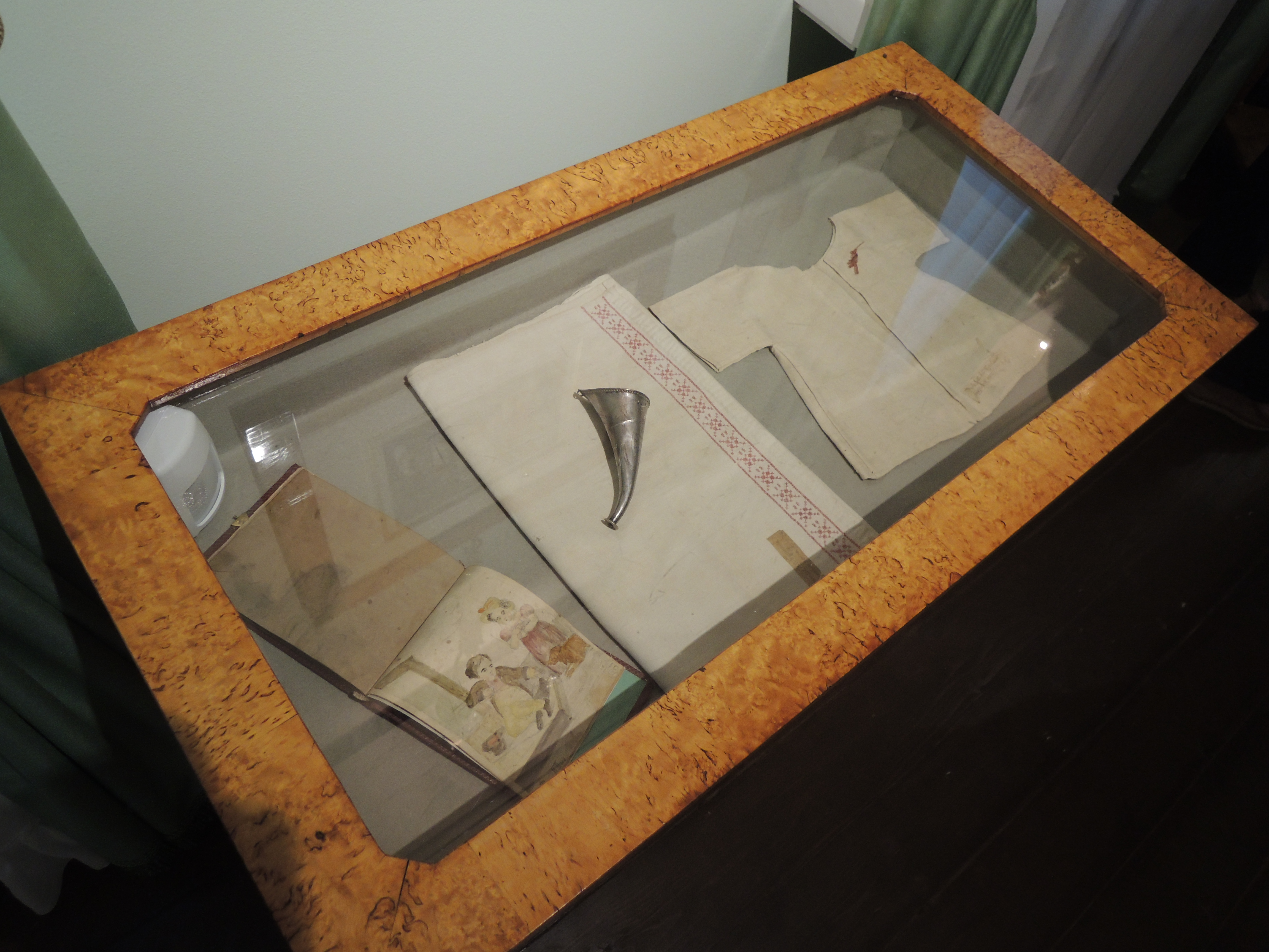 Дом-музей В. Л. Пушкина (филиал Государственного музея А. С. Пушкина) в день открытия 6 июня 2013 после масштабной реконструкции